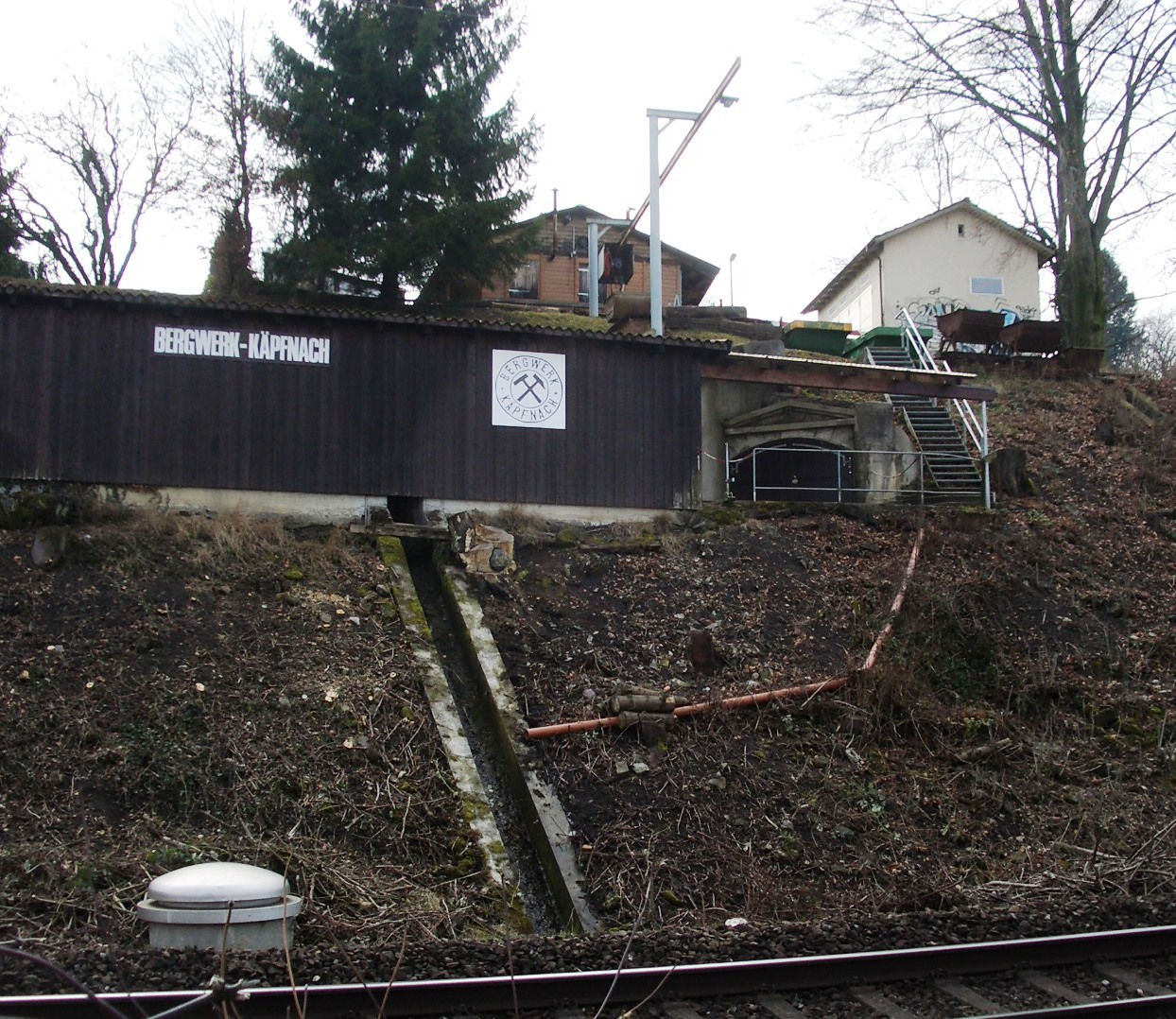 Horgen ZH, Switzerland